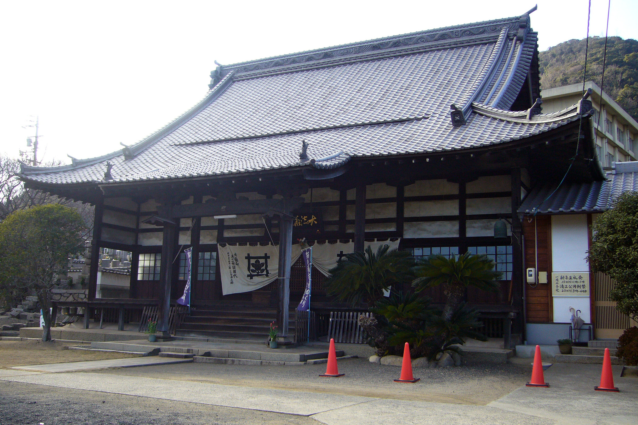 Hosenji in Fukuyama, Hiroshima, Japan